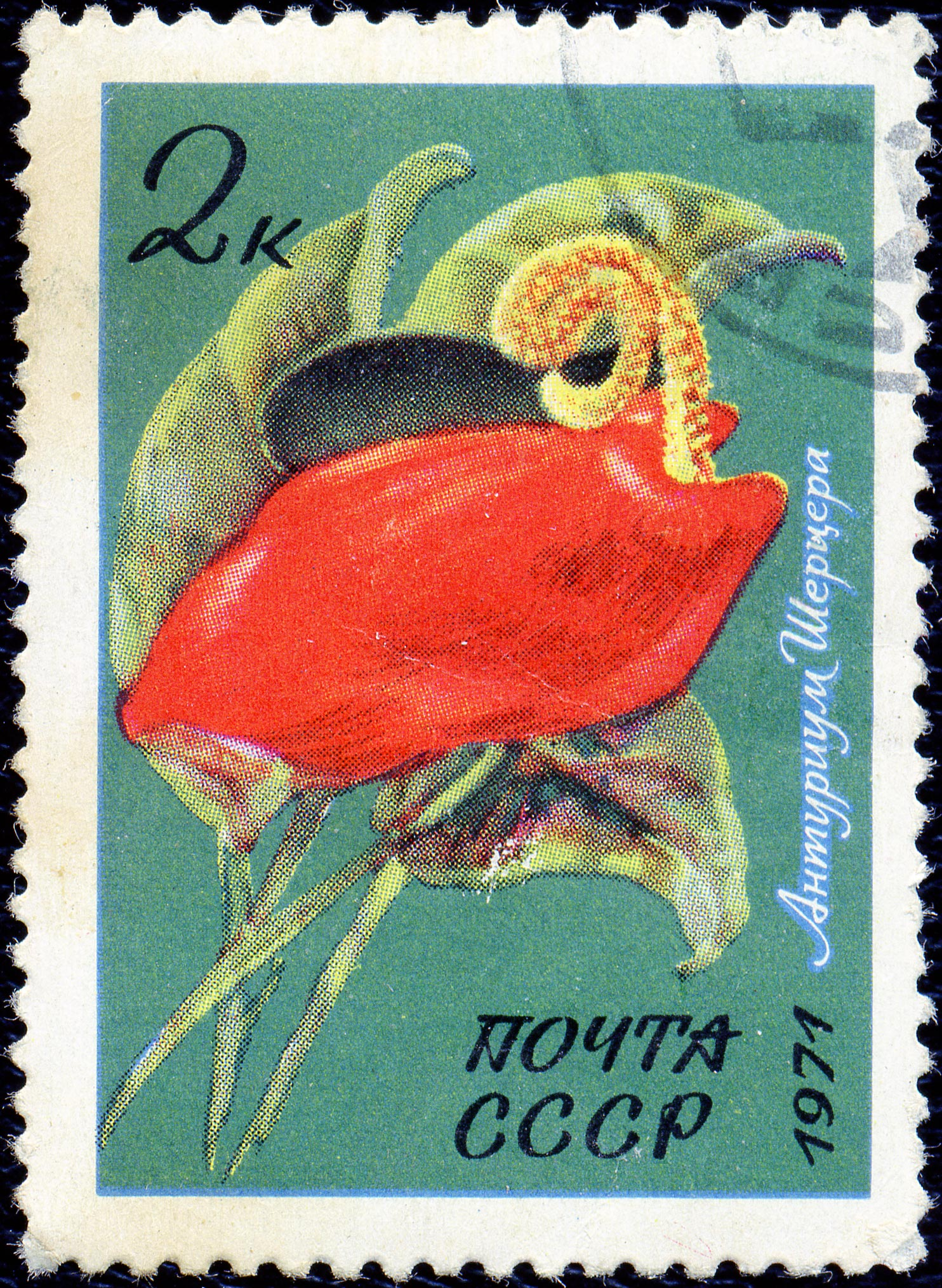 Почтовая марка СССР. 1971. Антуриум Шерцера